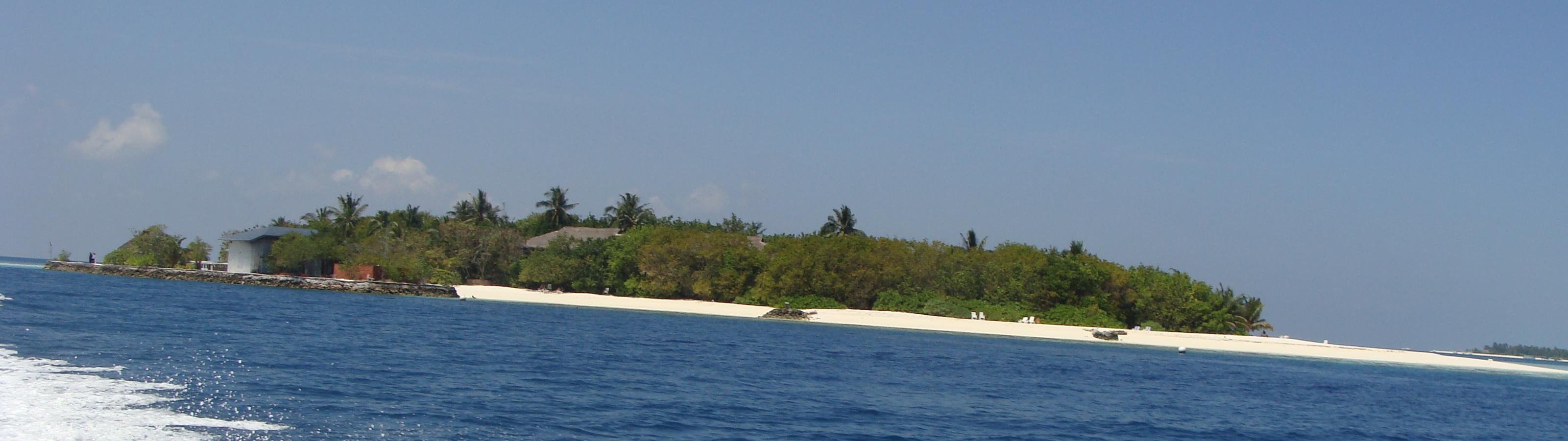 Vaadhoo island, Kaafu Atoll